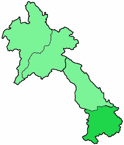 Mappa del Vicariato Apostolico cattolico di Parsé, in Laos. Lavoro personale, eseguito a partire da questa immagine di Commons. Fonte per i confini delle diocesi: Guida delle missioni cattoliche 2005, a cura della Congregatio pro gentium evangelizatione, Roma, Urbaniana University Press, 2005. Categoria:Chiesa cattolica in Laos